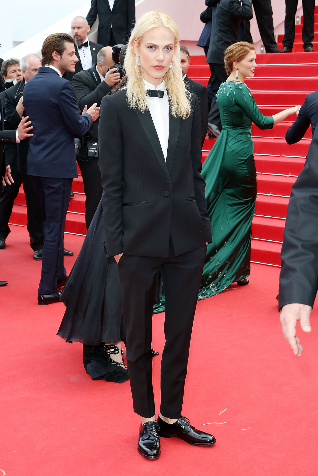 Aymeline Valade au festival de Cannes 2014